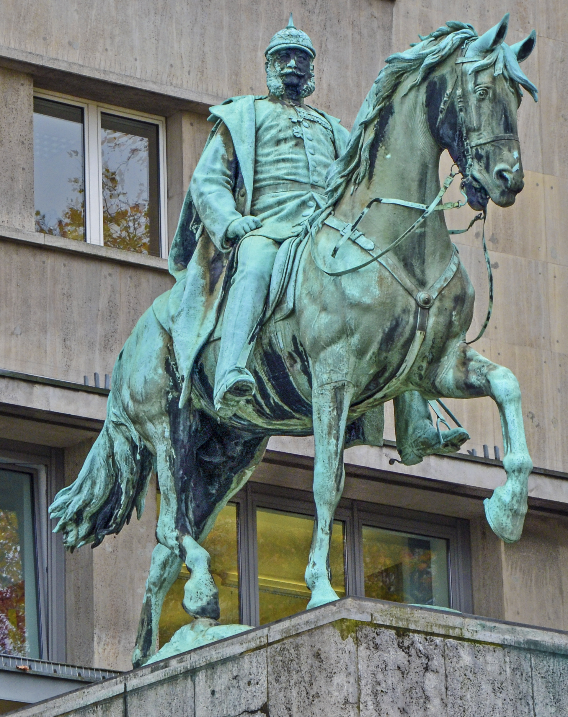 Kaiser-Wilhelm I.-Denkmal im Essener Stadtkern am Burgplatz